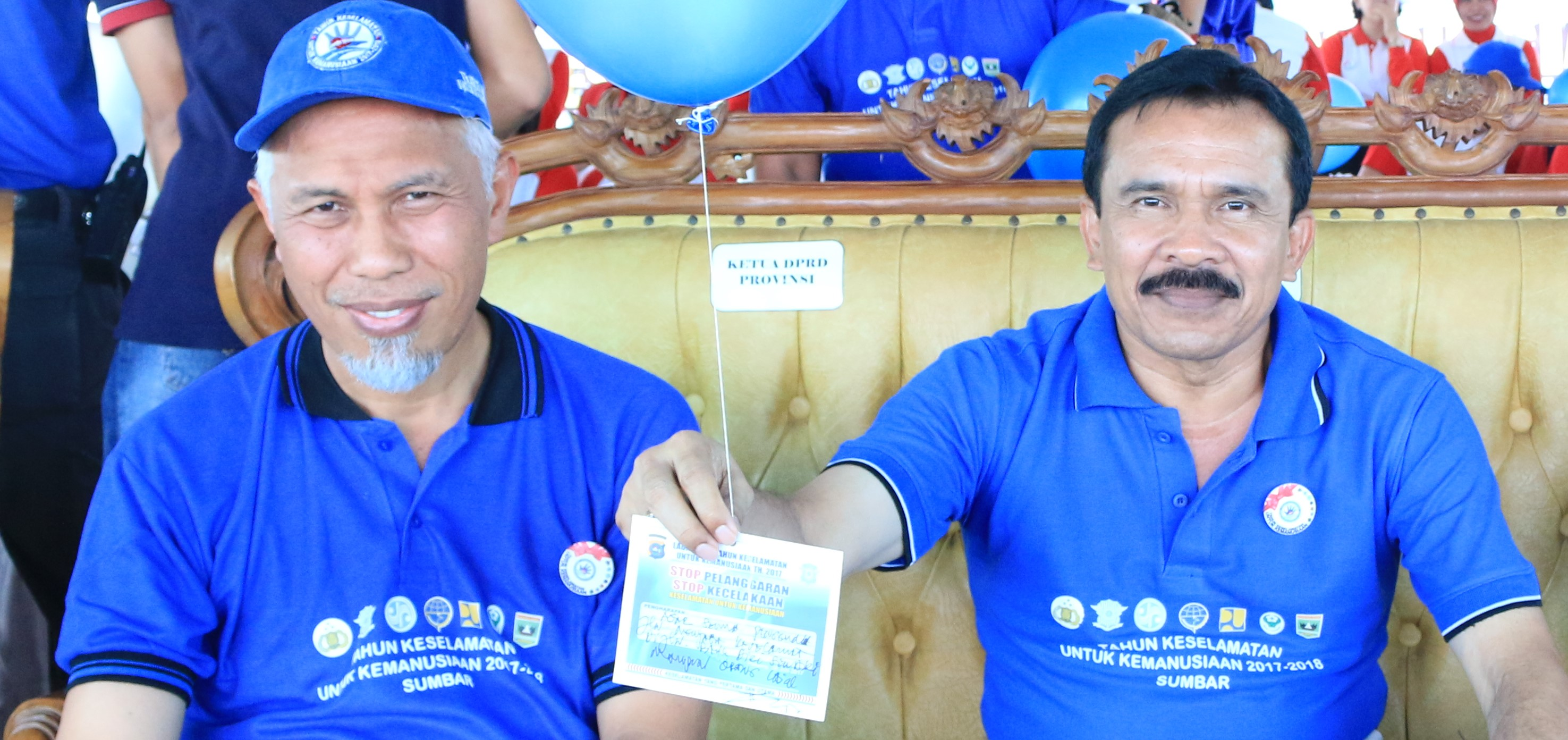 Mahyeldi dan Fakhrizal Kebanggaan Urang Agam